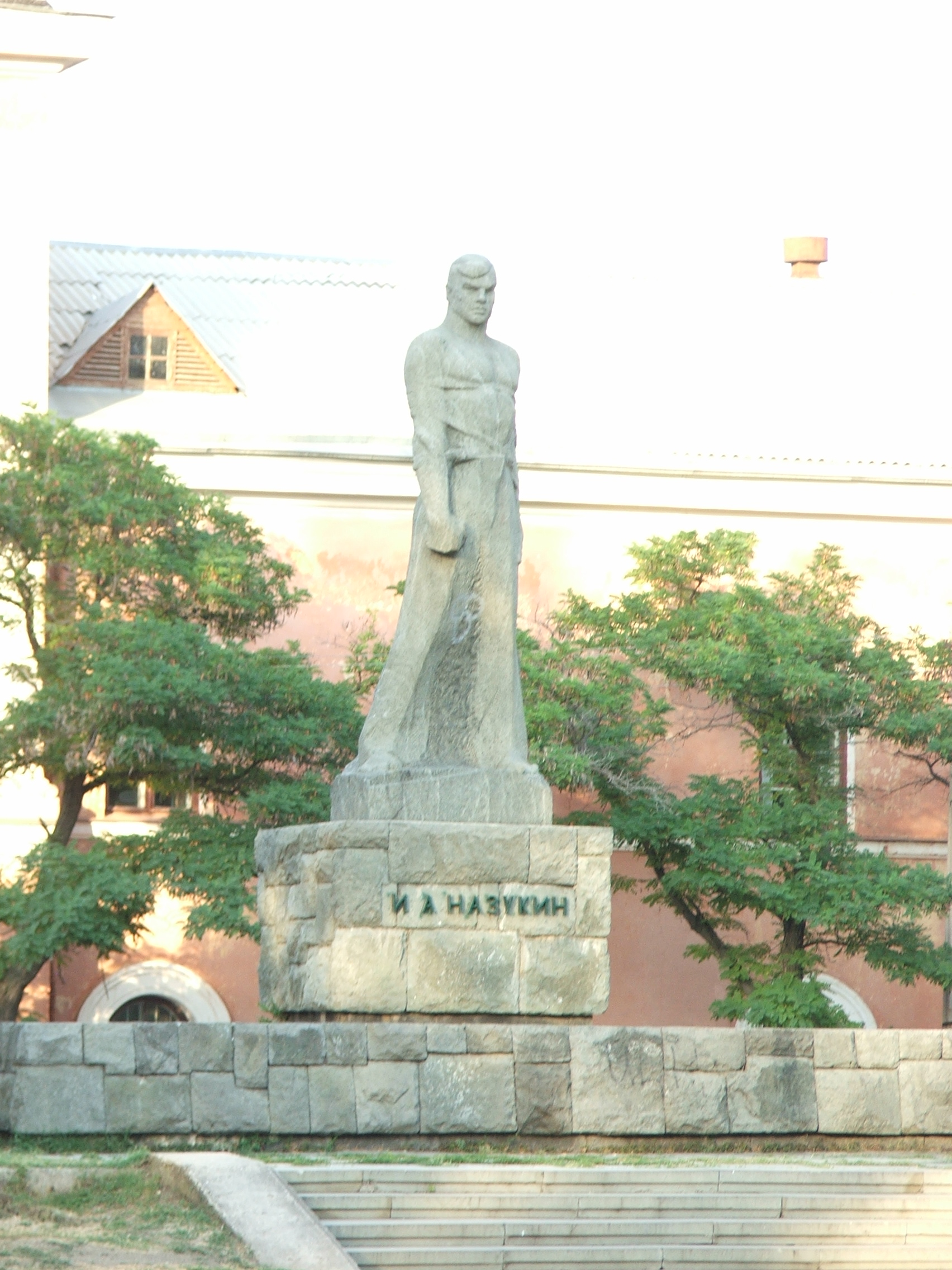 Пам'ятник І. А. Назукіну, Феодосія, вул. Горького